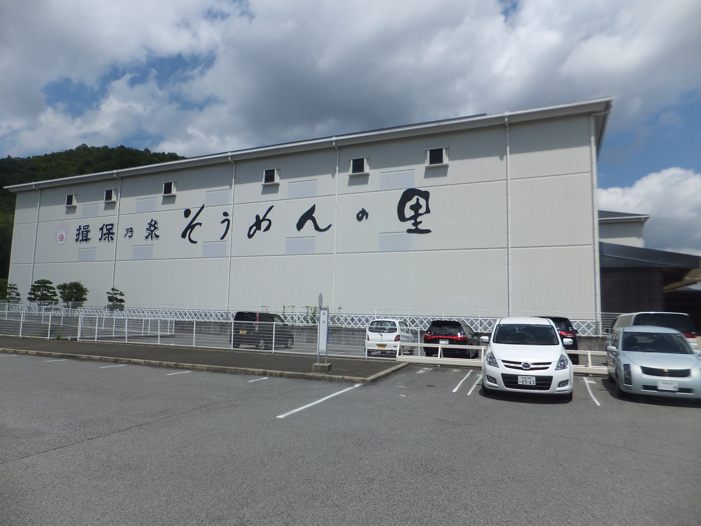 揖保乃糸資料館そうめんの里